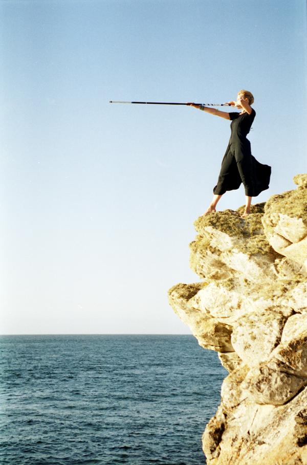 Souffler à « l’infini » retourne l’attention vers le souffleur